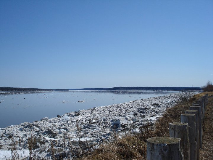 © 2011 Kyla Winacott